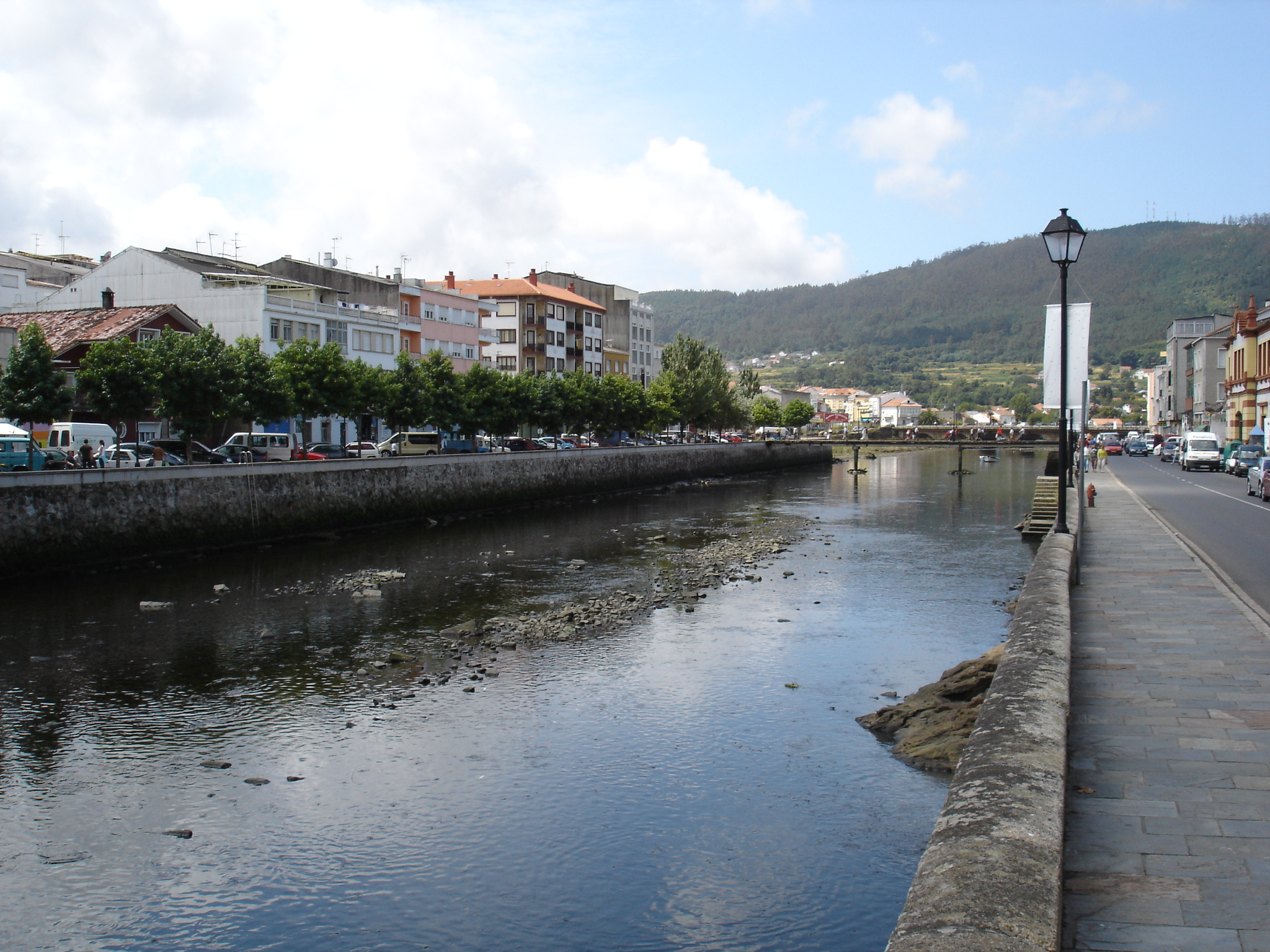 Embouchure dans l'Océan Atlantique du petit fleuve, le Traba, à Noia, en Galice (Espagne).